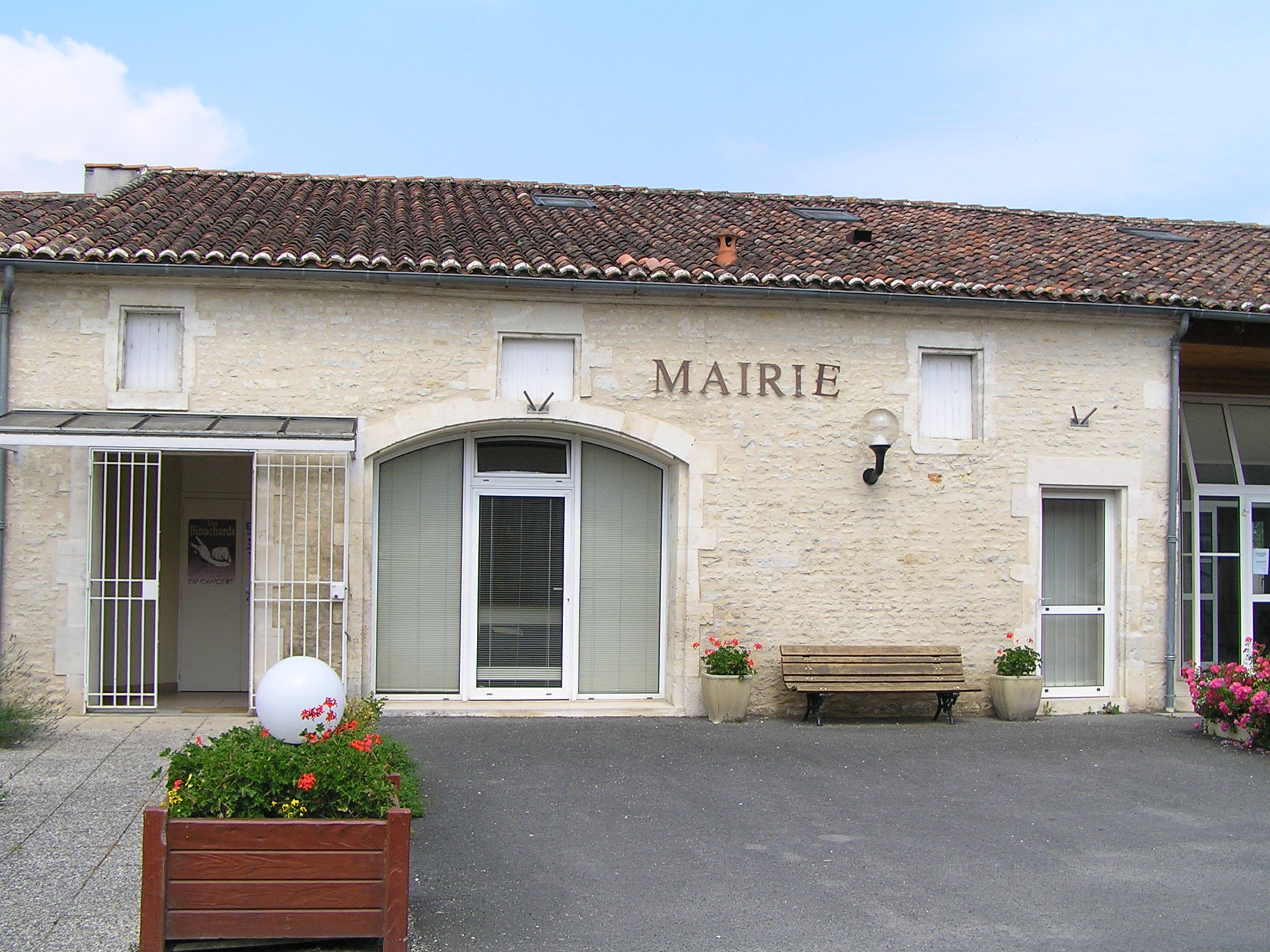 mairie de Réparsac